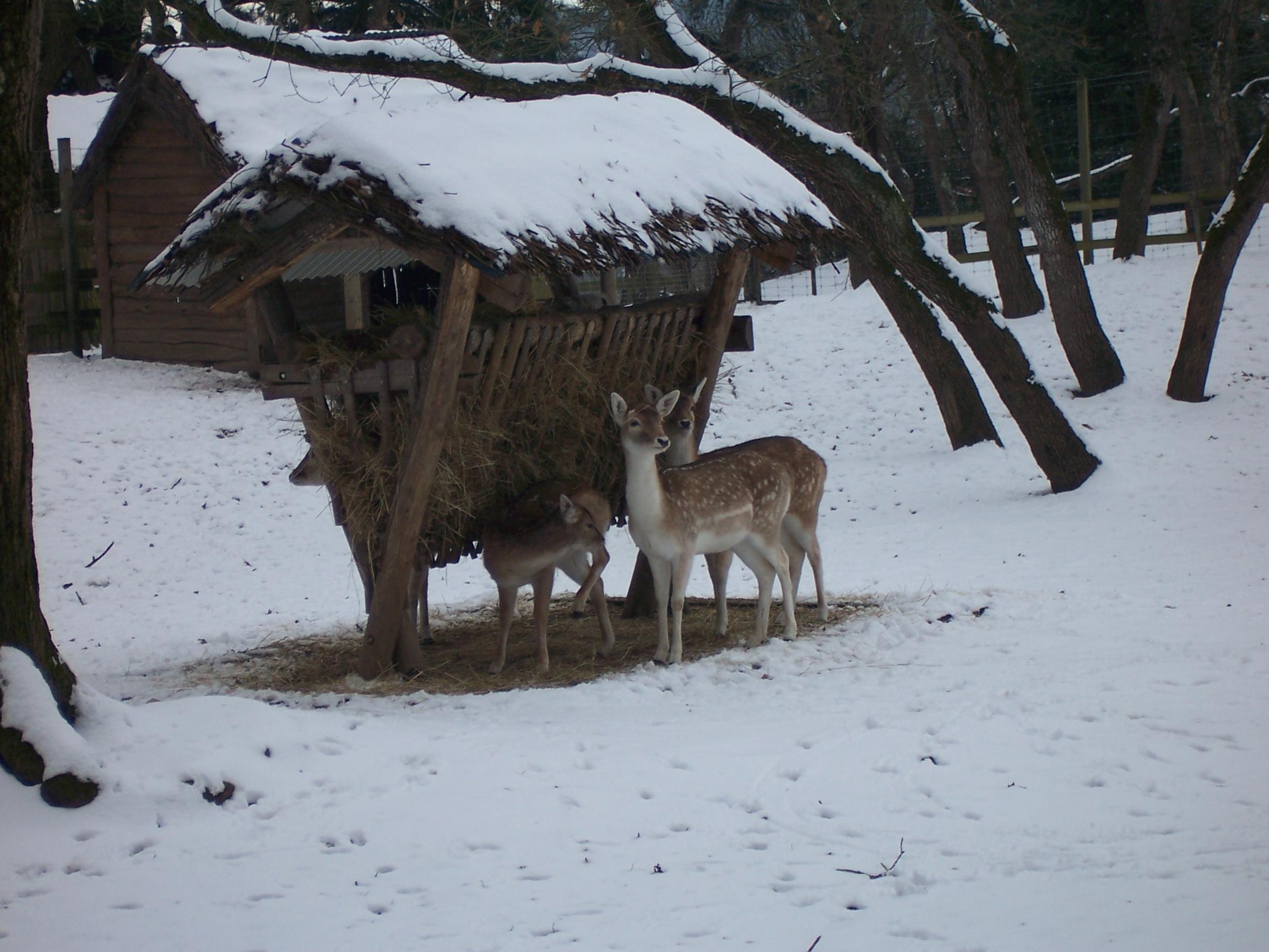 Enclos des daims